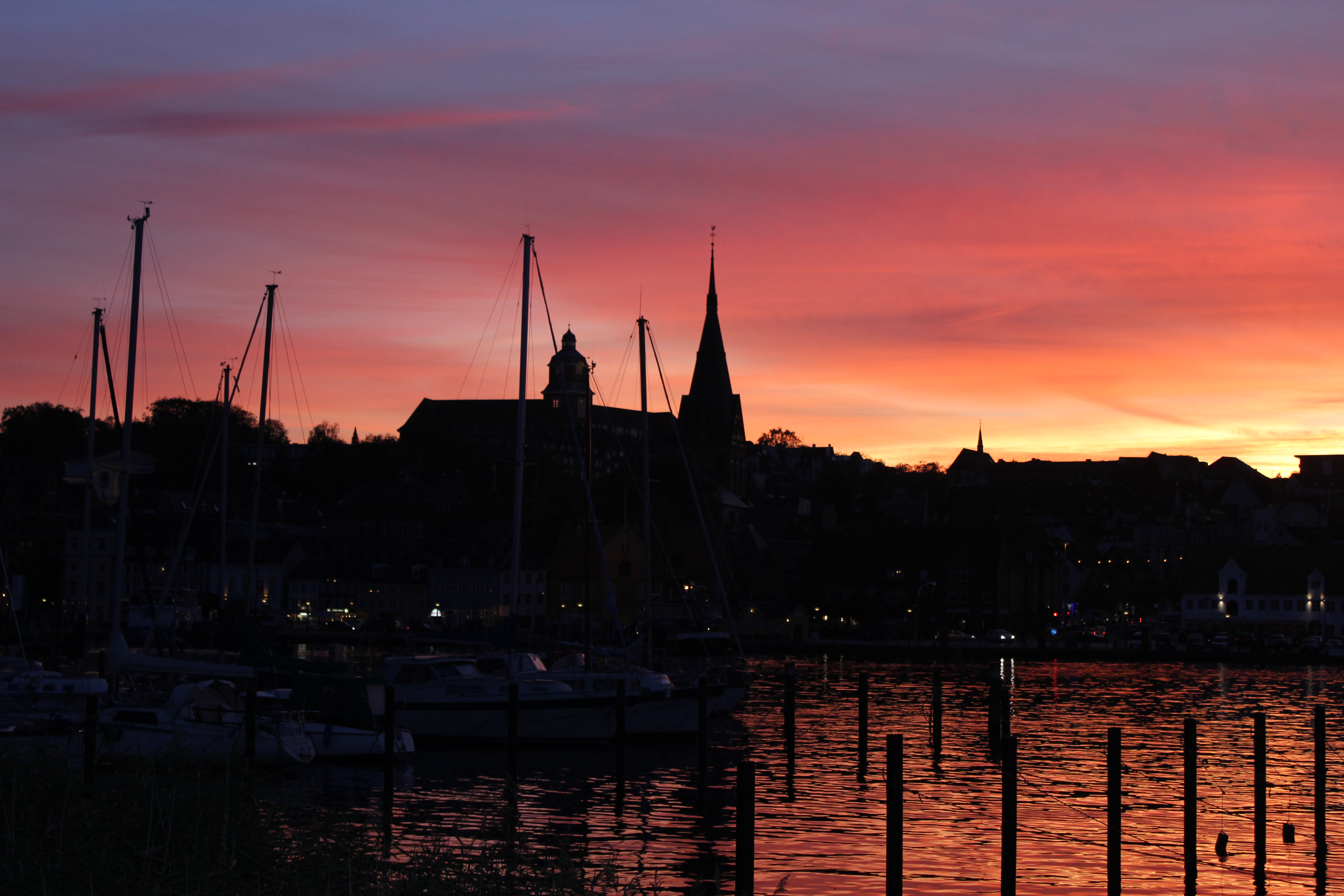 Letzte Sonnenstrahlen beim Spaziergang am Flensburger Hafen